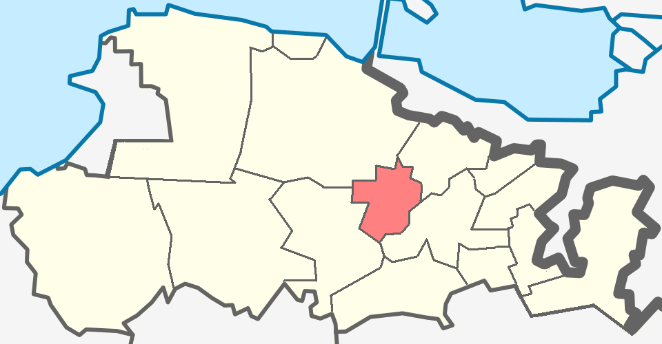 Оржицское сельское поселение Ломоносовского района Ленинградской области.